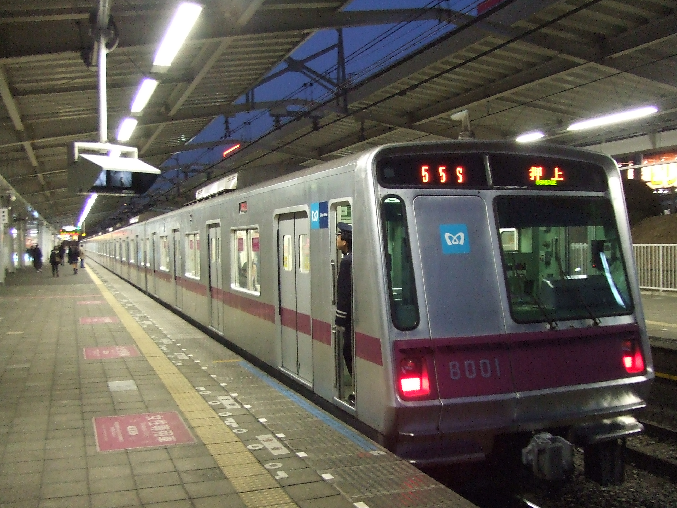 東京メトロ 8000系 更新前